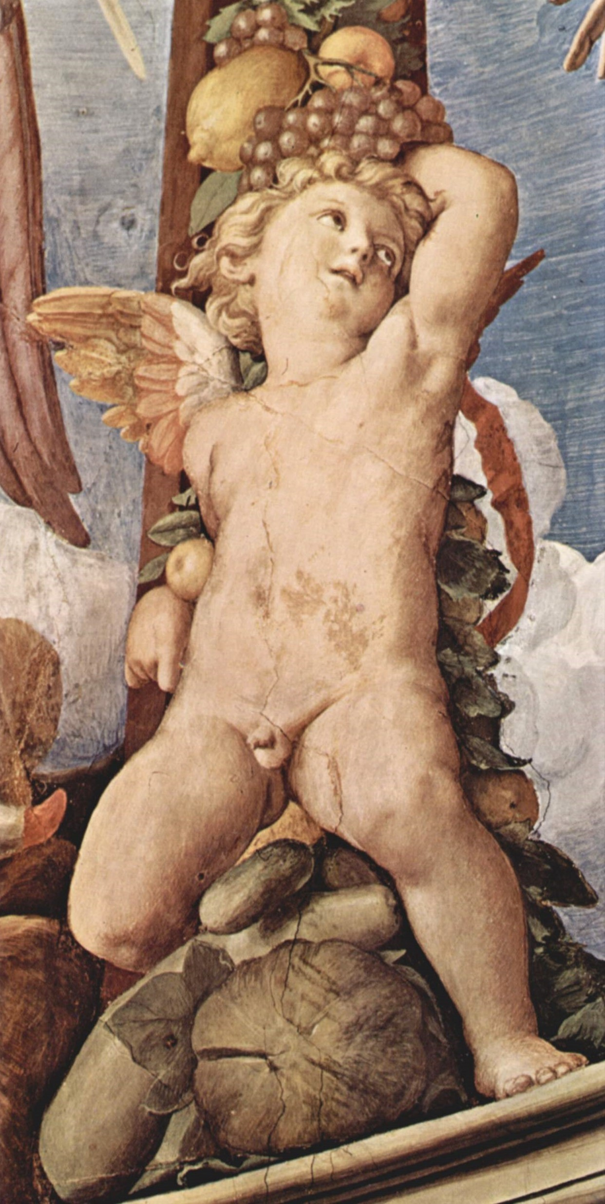 Dettaglio da un affresco di Agnolo Bronzino nella volta della Cappella di Eleonora, a Firenze, che ritrae un amorino (o un putto).